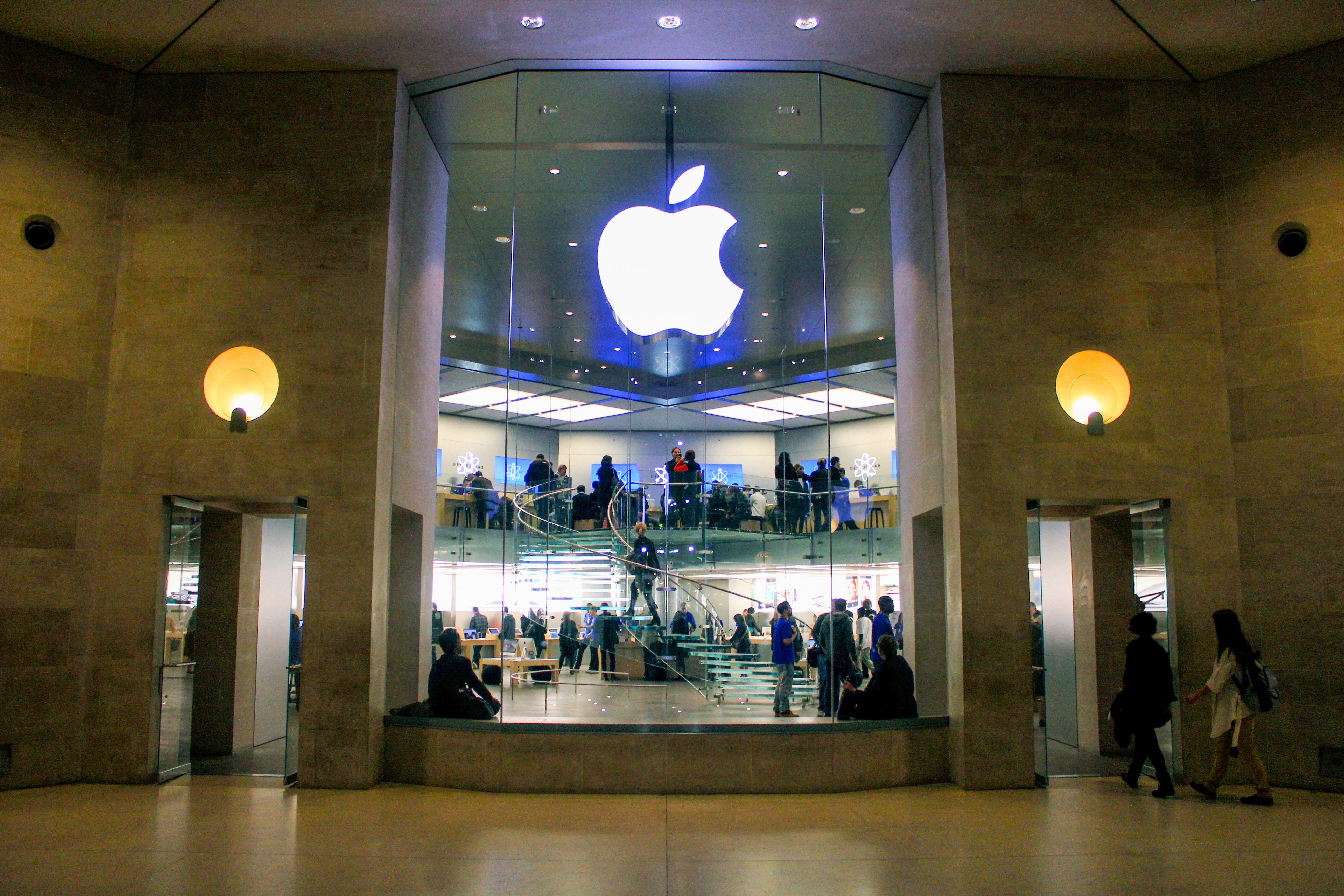 Apple Store Carrousel du Louvre